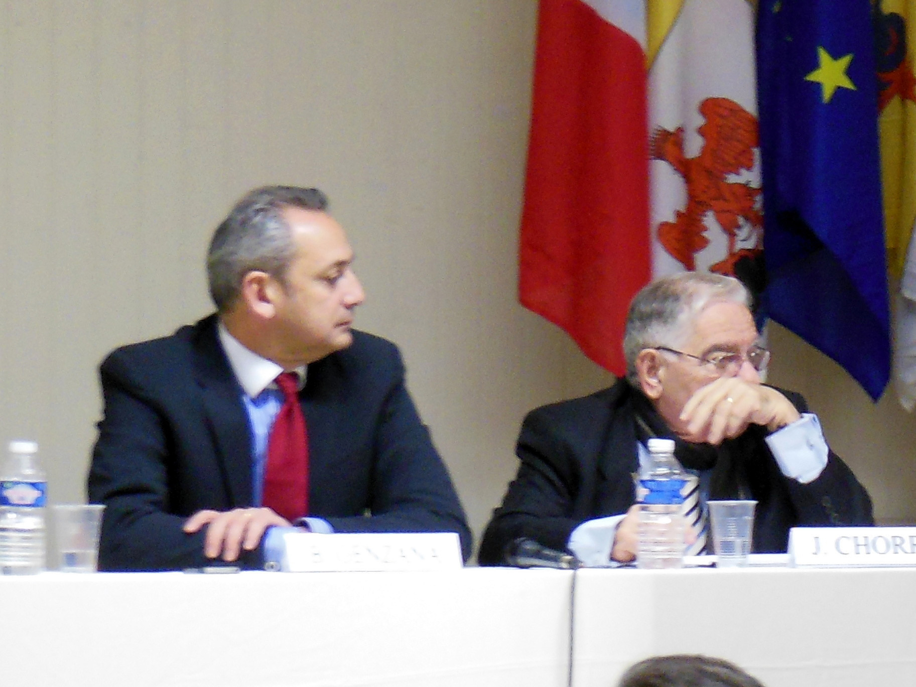 Bruno Genzana et Jean Chorro lors d'une réunion publique à Aix-en-Provence en février 2013